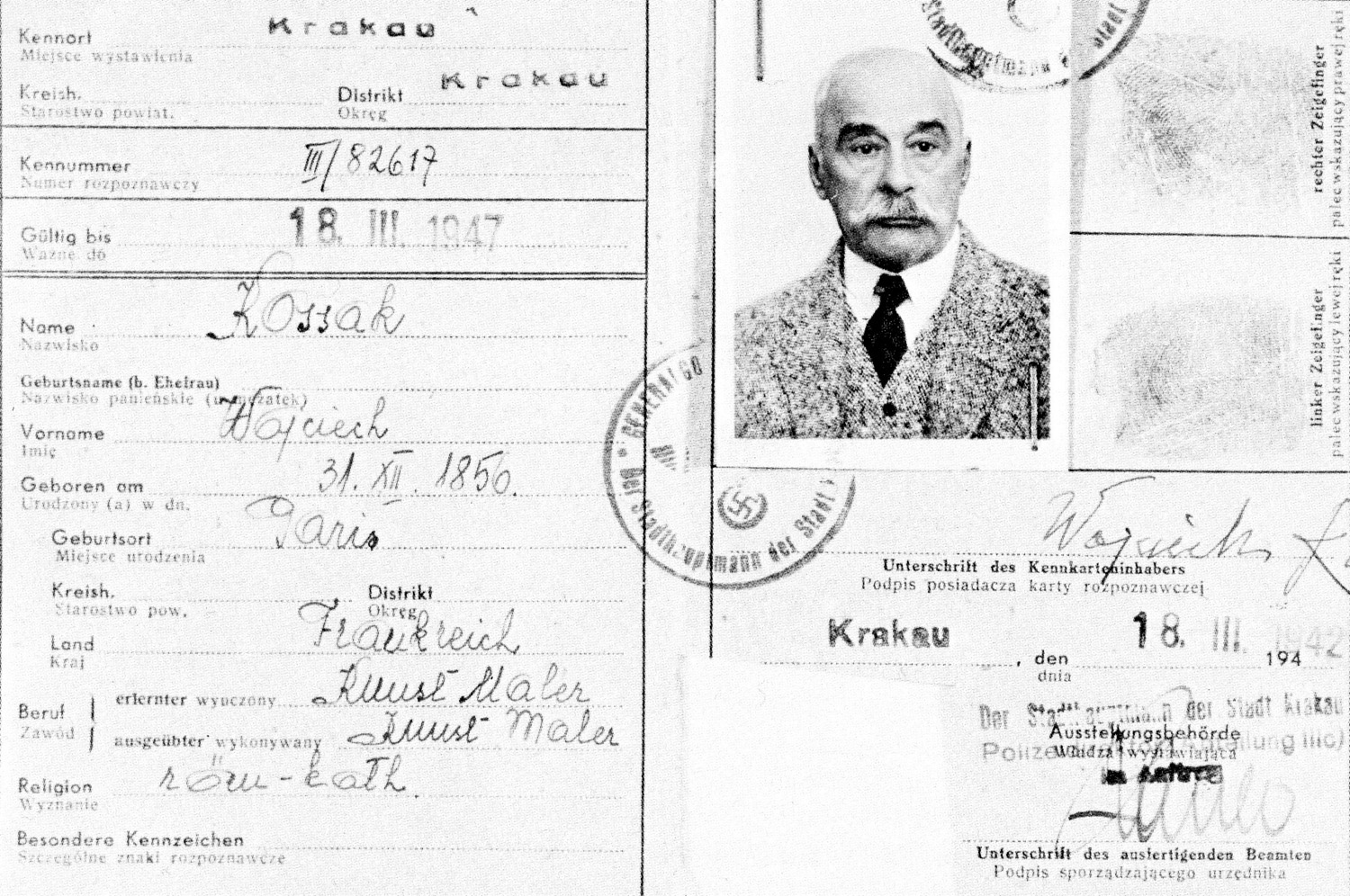 Wojciech Kossak's Kennkarte